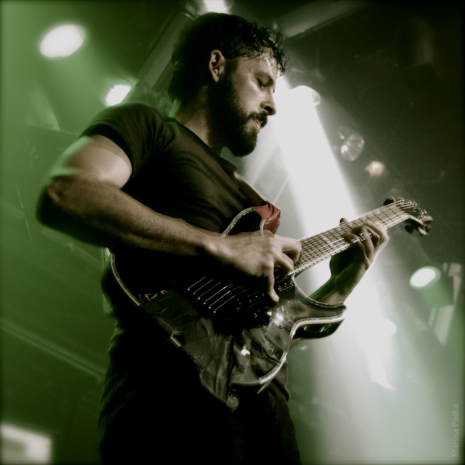 Ben Weinman of DEP